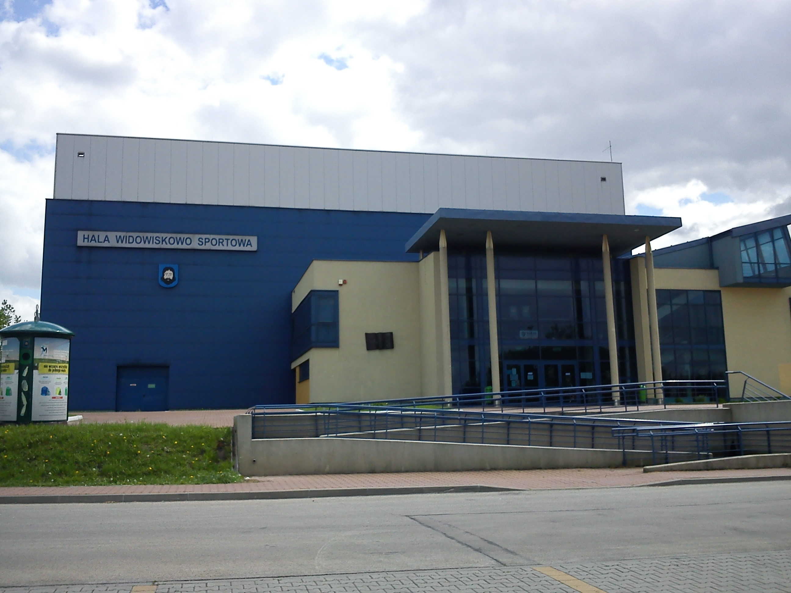 Hala Widowiskowo-Sportowa w Mysłowicach.